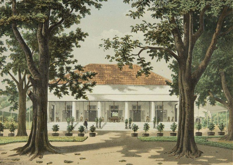 Litho. Litho naar een oorspronkelijke aquarel van J. Rappard.. De woning van de gouverneur aan de westkust van Sumatra